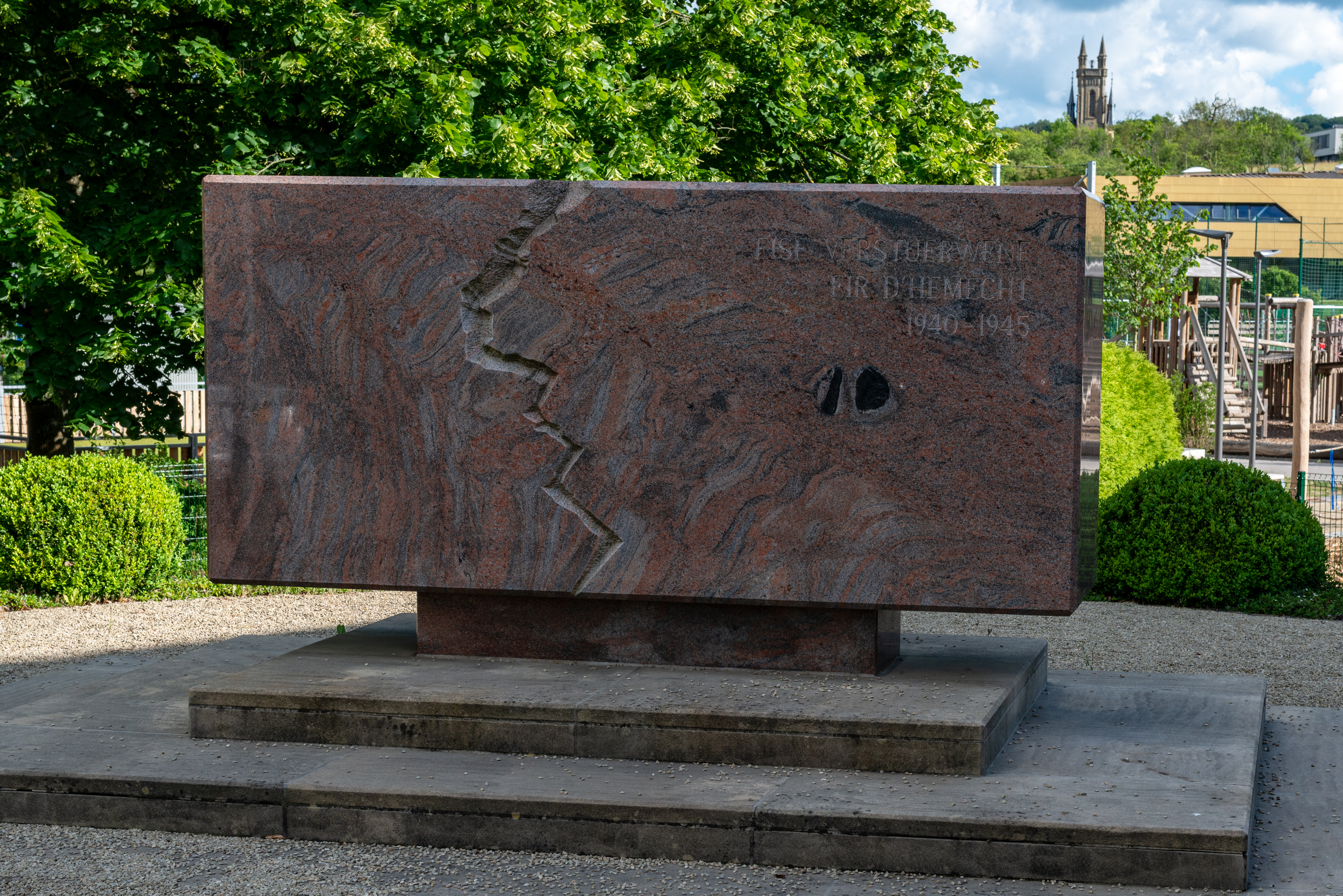 De Monument aux morts, zu Ueweraanwen "Am Sand".